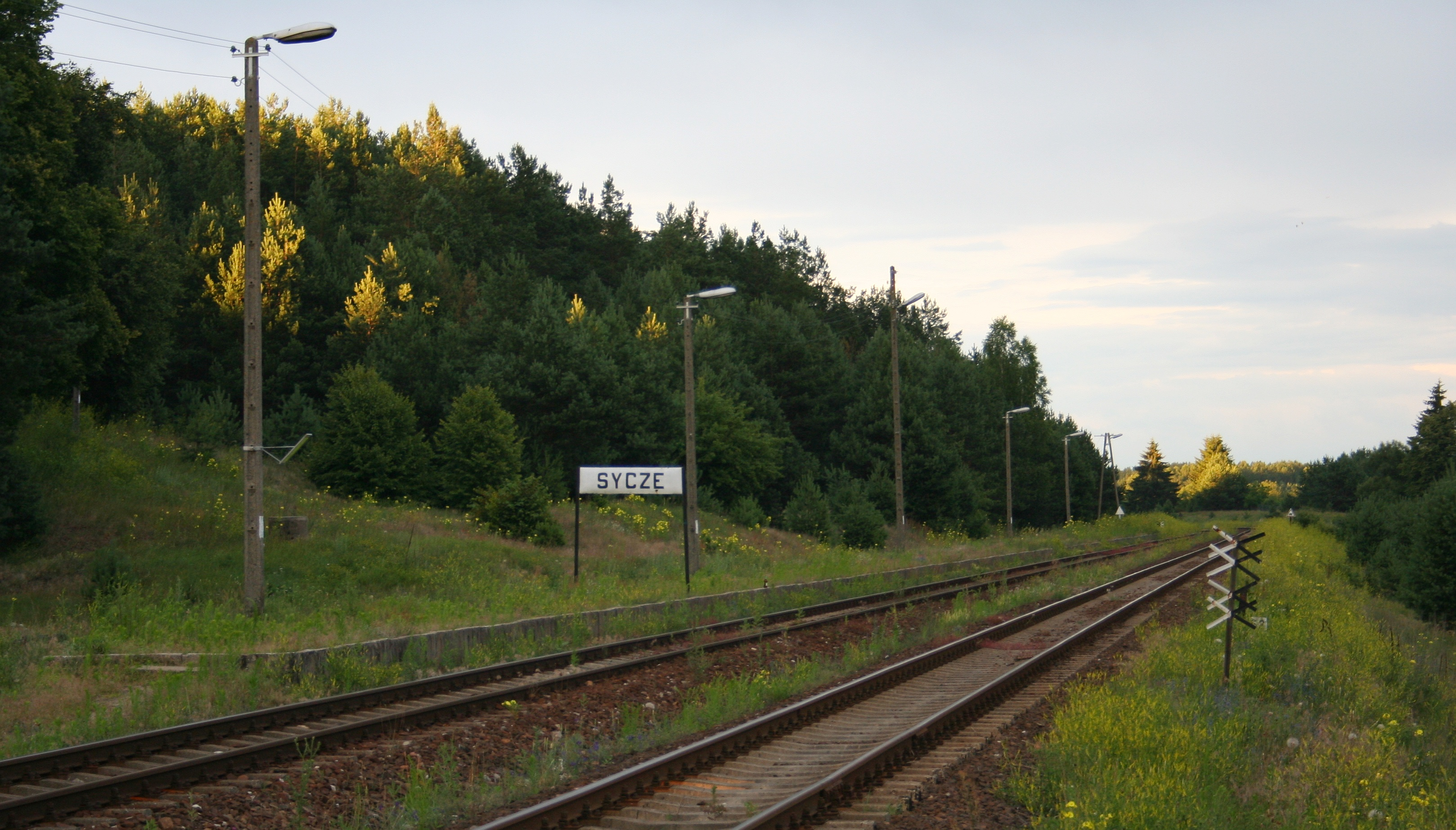 przystanek kolejowy w miejscowości Sycze, gmina Nurzec-Stacja, woj. podlaskie